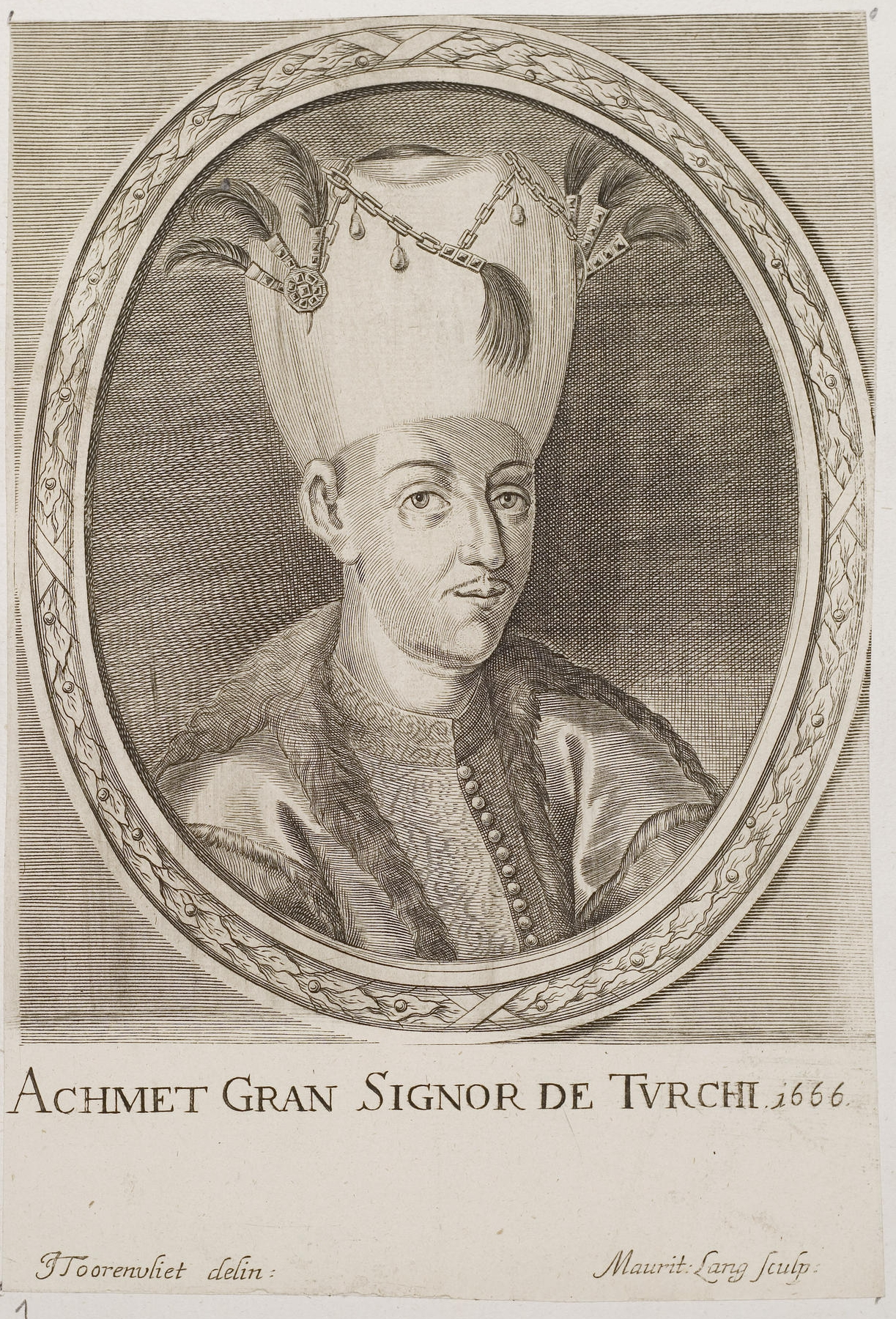 Grafik aus dem Klebeband Nr. 2 der Fürstlich Waldeckschen Hofbibliothek Arolsen Motiv: "Achmet Gran Signor de Turchi 1666" (= Köprülü Fâzıl Ahmed Pascha)